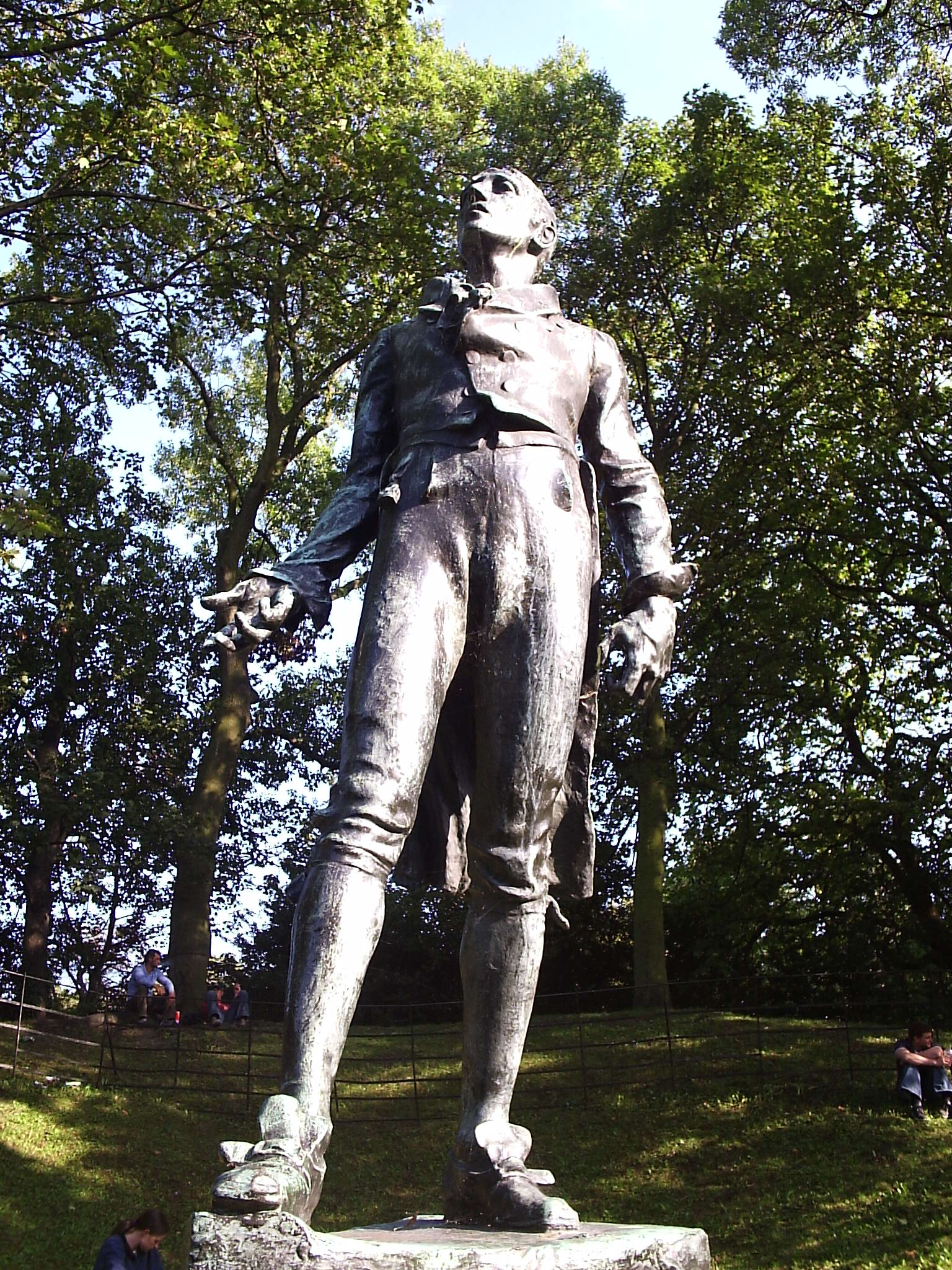 Robert Emmet statue in St. Stephen's Green, Dublin